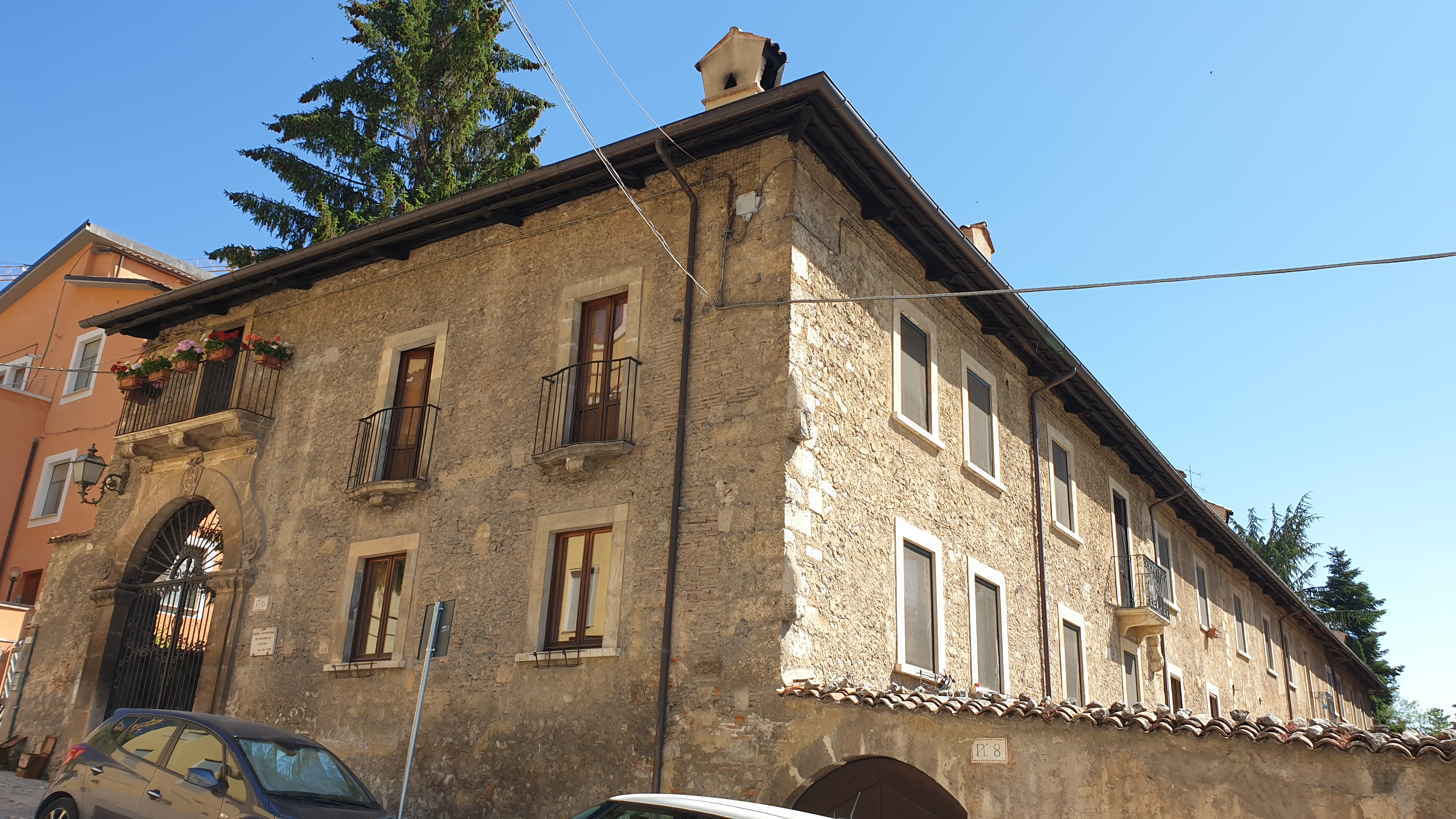 L'Aquila: Convento dei Crociferi di San Matteo